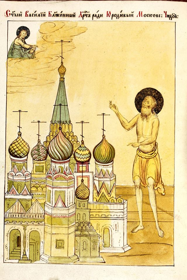 Василий Блаженный